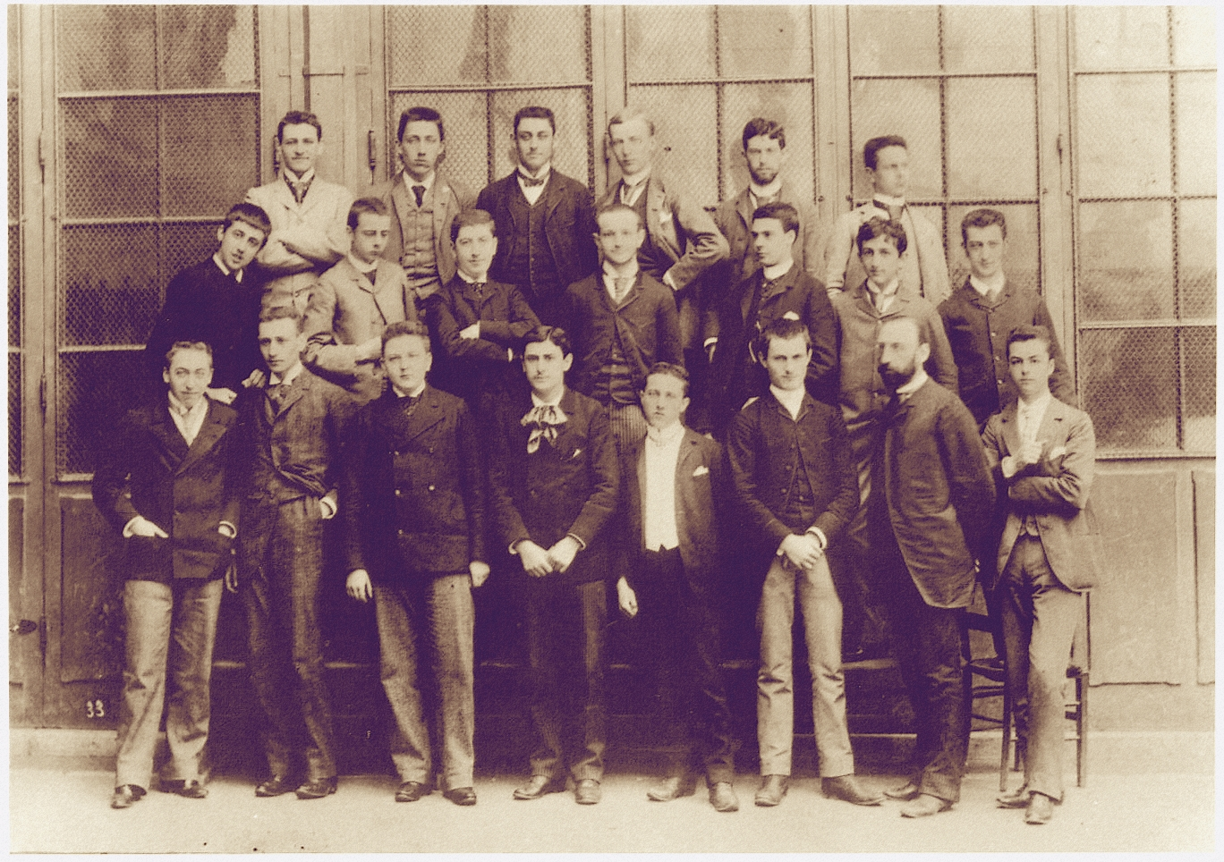 Marcel Proust (au 2e rang, 1er à gauche) en 1888, sur une photographie de classe. Au dessus de lui : Raoul Versini ; au 1er rang, 3ème à gauche : David David-Weill ; professeur : Alphonse Darlu. Classe de rhétorique au lycée Condorcet à Paris.Photographie attribuée à Pierre Petit, photographe attitré du lycée Condorcet à cette époque.